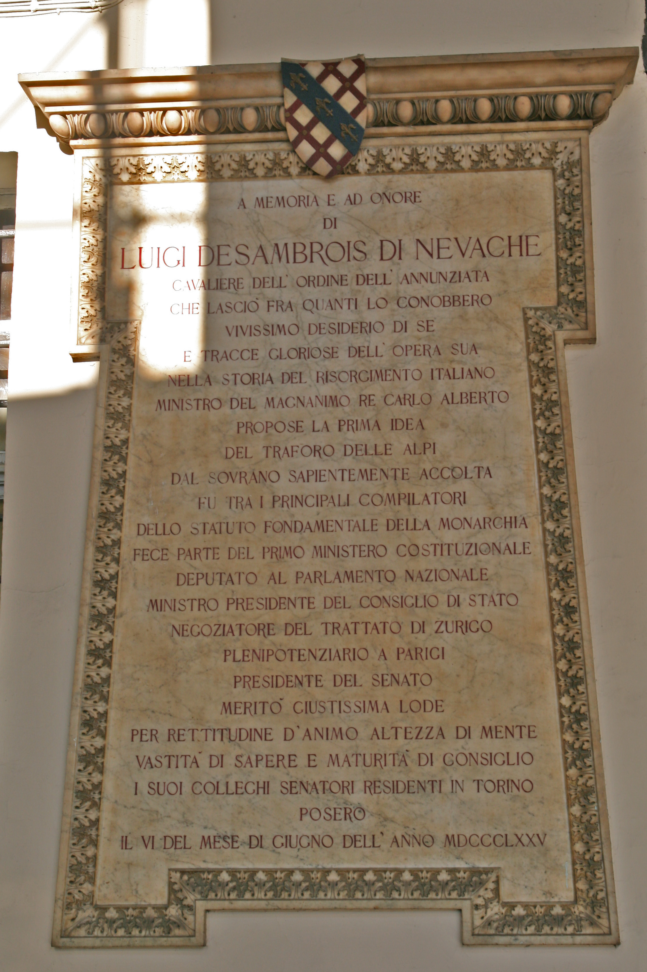 Targa del Cavaliere della SS. Annunziata Luigi des Ambrois di Nevache a Torino